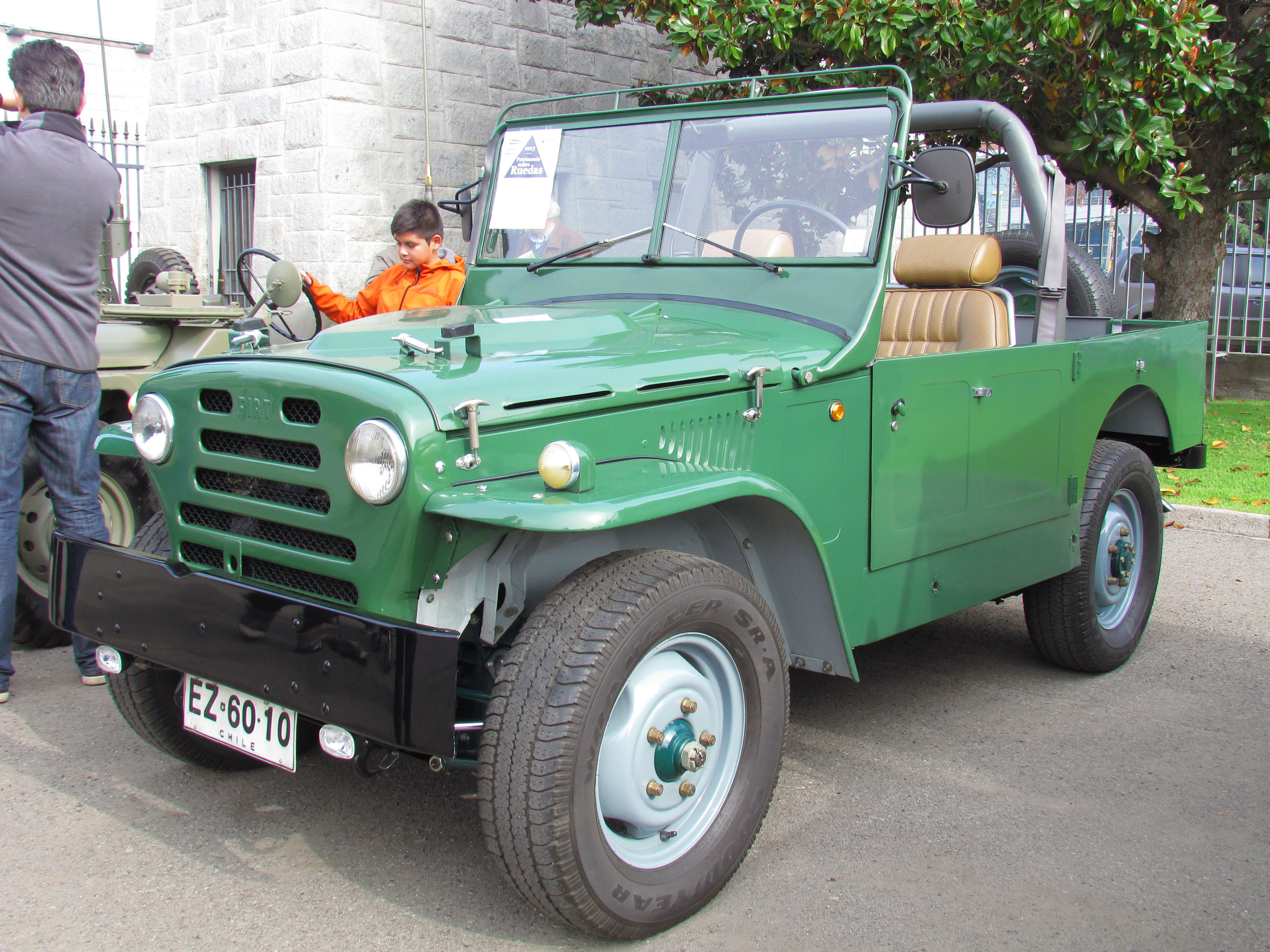 Patrimonio sobre ruedas 2013